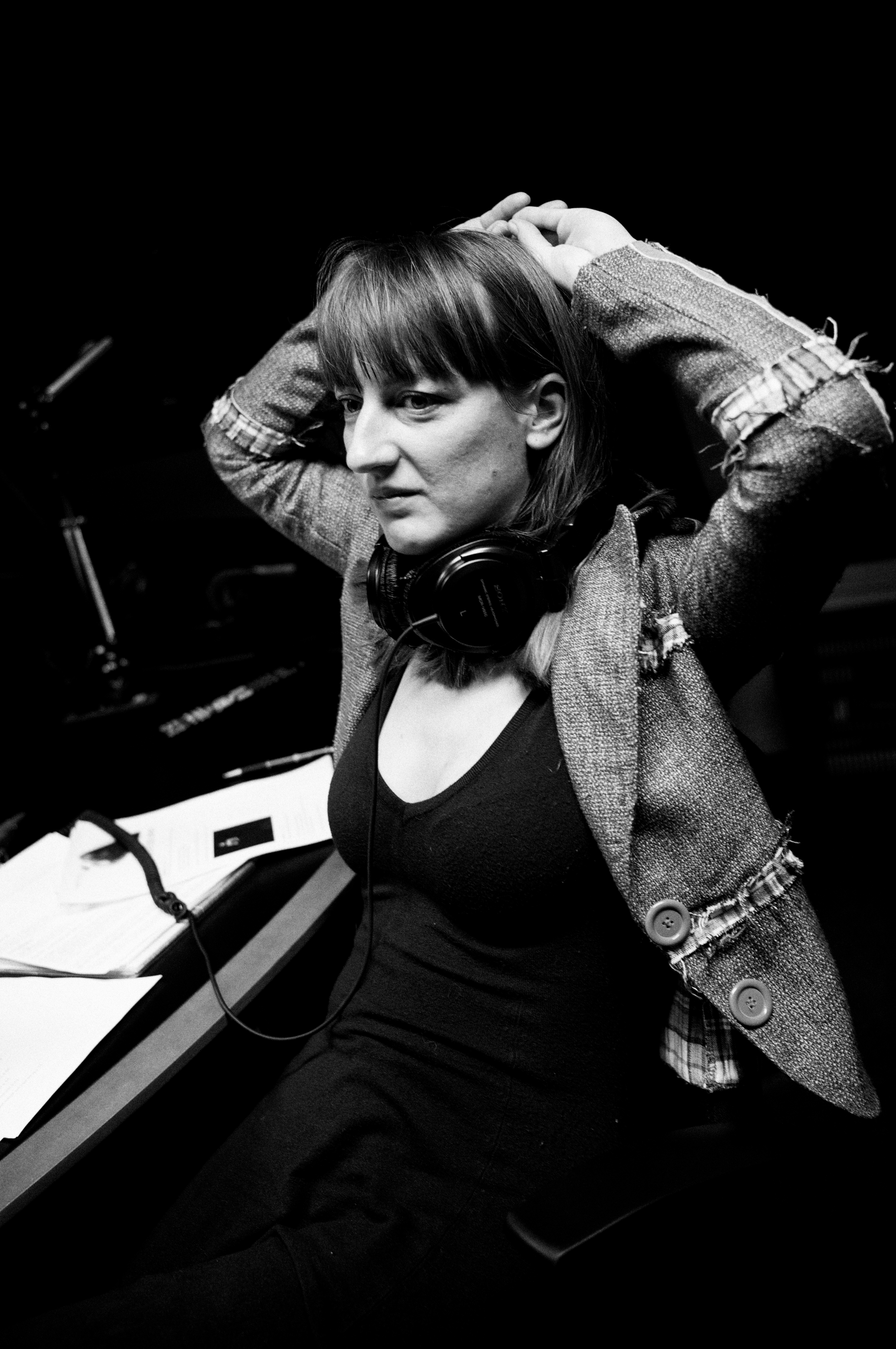 Dutch digital pioneers Petra Else Jekel (Oeverloos)